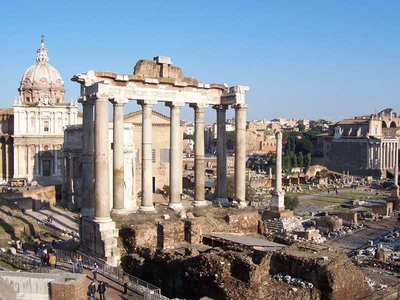 Roma - Veduta del Foro Romano